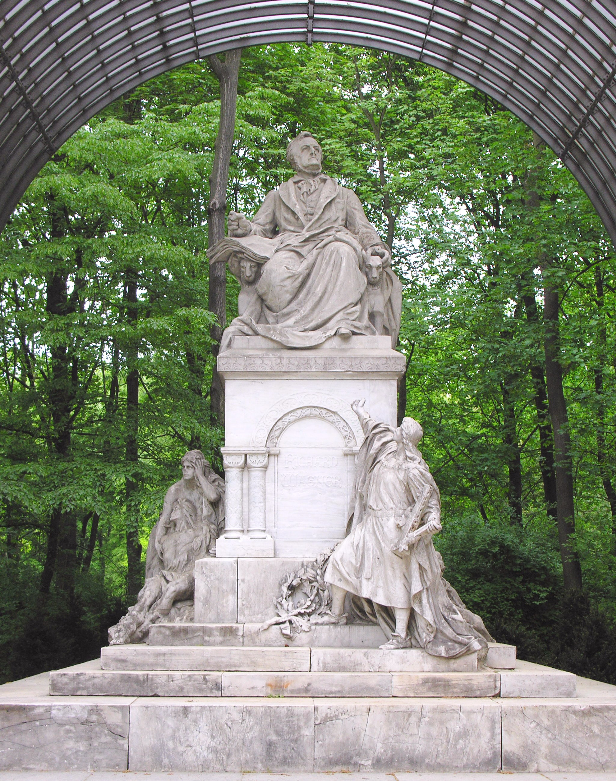 Richard-Wagner-Denkmal im Großen Tiergarten in Berlin - Material ist griechischer Marmor - Wagner-Abbildung ist 2.7m hoch - von Gustav Eberlein in 1903 geschaffen. Foto Wolfang Pehlemann DSCN1702